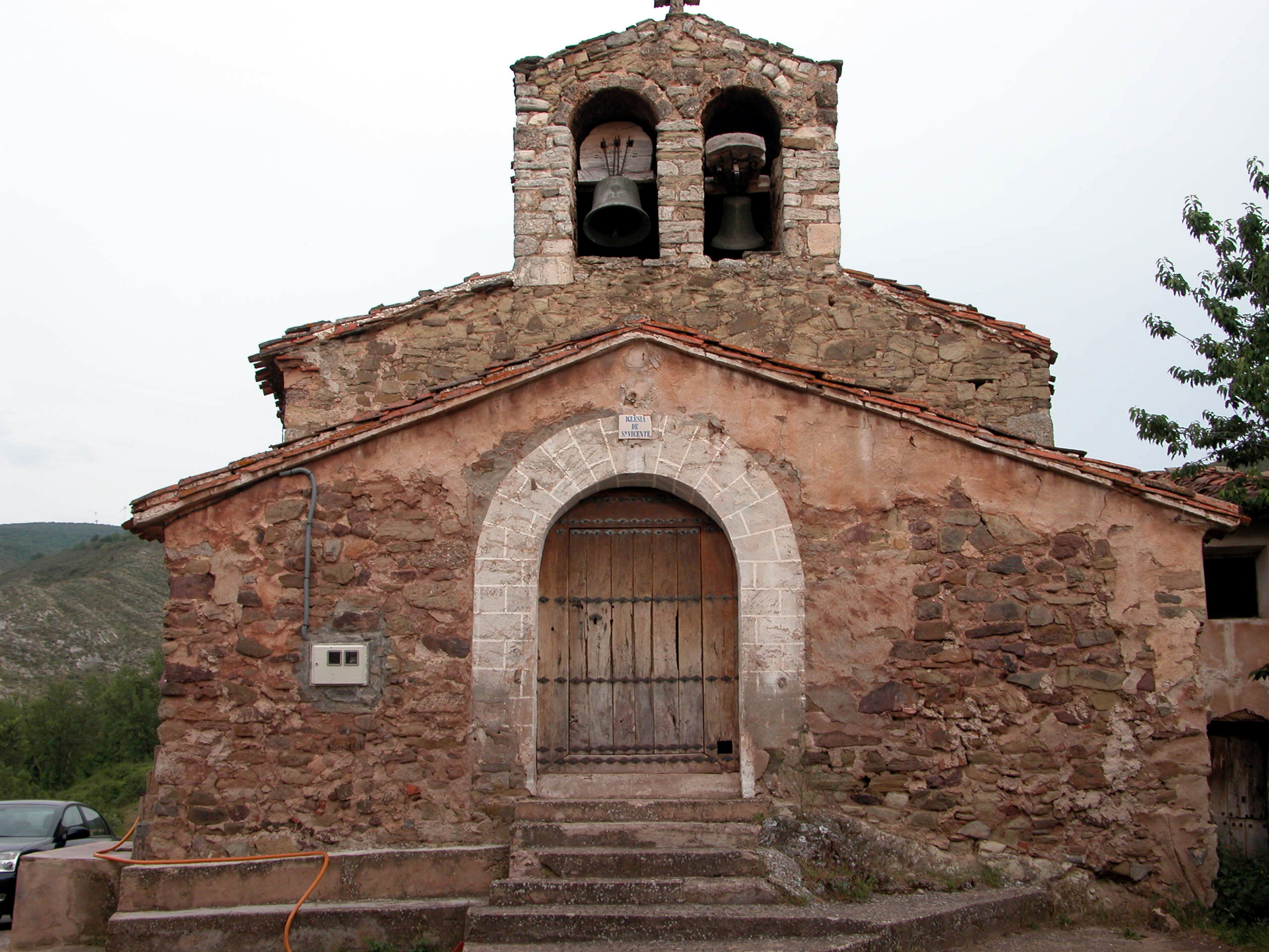 Iglesia de San Vicente en San Vicente de Robres, aldea de Robres del Castillo (La Rioja, España)